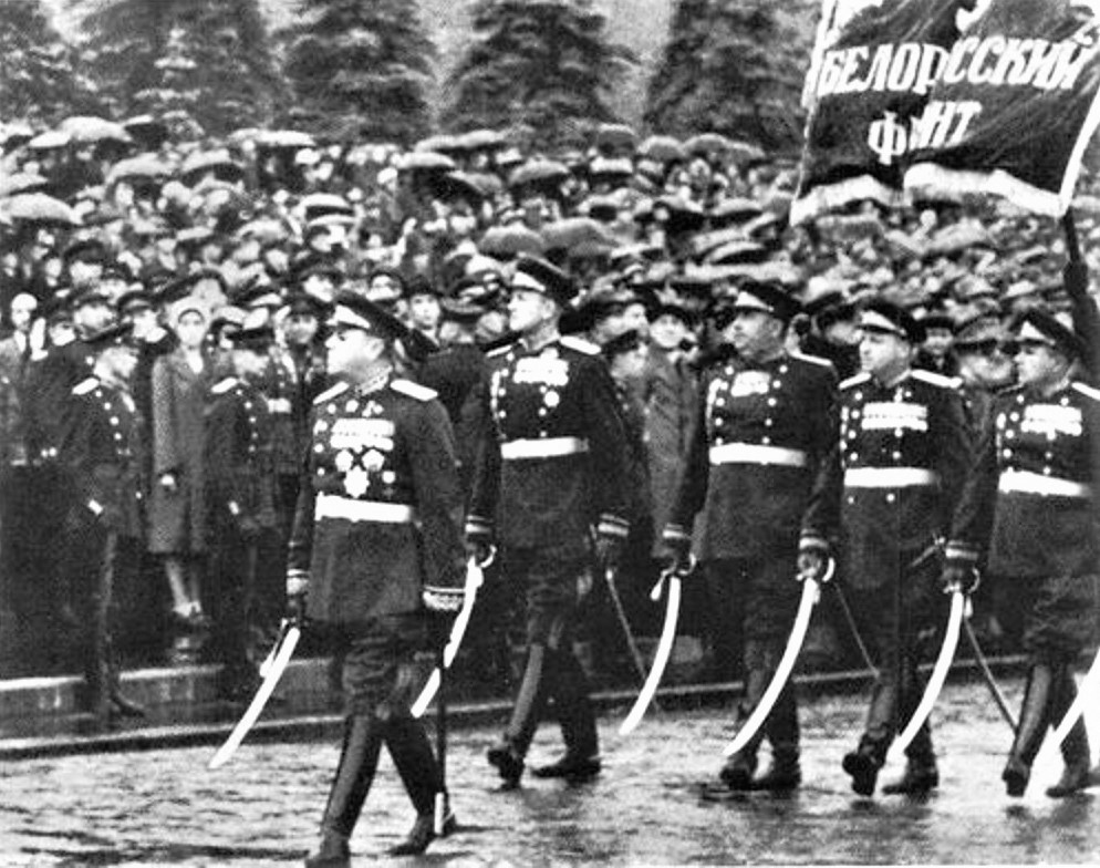 Маршал Советского Союза А. М. Василевский на параде Победы впереди сводного полка 3-го Белорусского фронта. Командует сводным полком 3-го Белорусского фронта дважды Герой Советского Союза генерал-лейтенант П. К. Кошевой